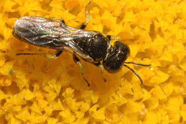 Lindenius panzeri from Commanster, Belgian High Ardennes .